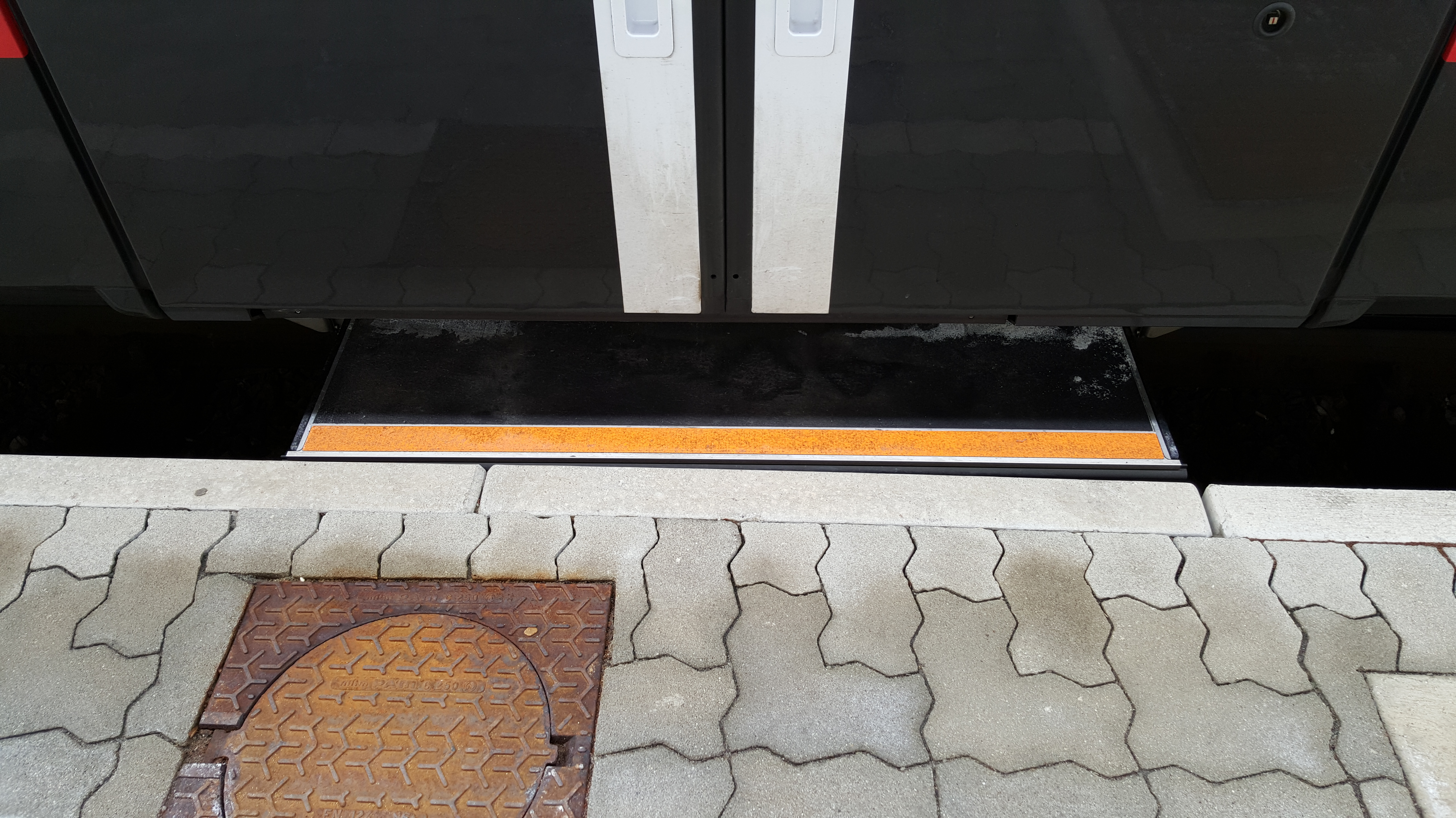 ÖBB cityjet-Schiebetritt 380mm